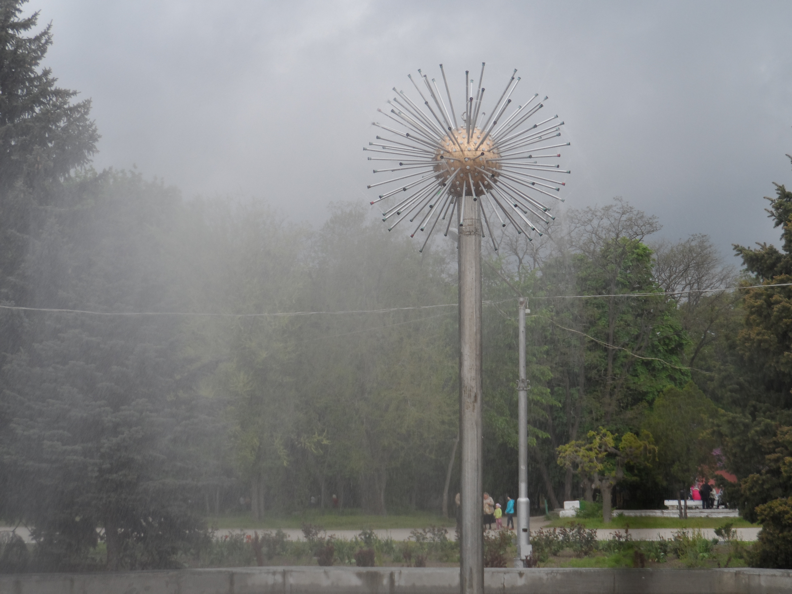 Мелитополь